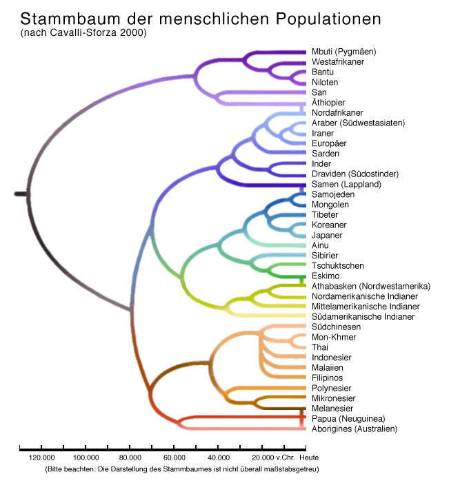 Die Populationen der Menschheit nach Cavalli-Sforza (2000). Die Zahlen der genetischen Differenzen (= Trennung v. Chr.) wurden vom Stammbaum der 38 Populationen weitgehend maßstabsgetreu auf eine Farbskala der „Regenbogenfarben" übertragen. Die so ermittelten Farbwerte bestimmen die Farbgebung der Pfeile.